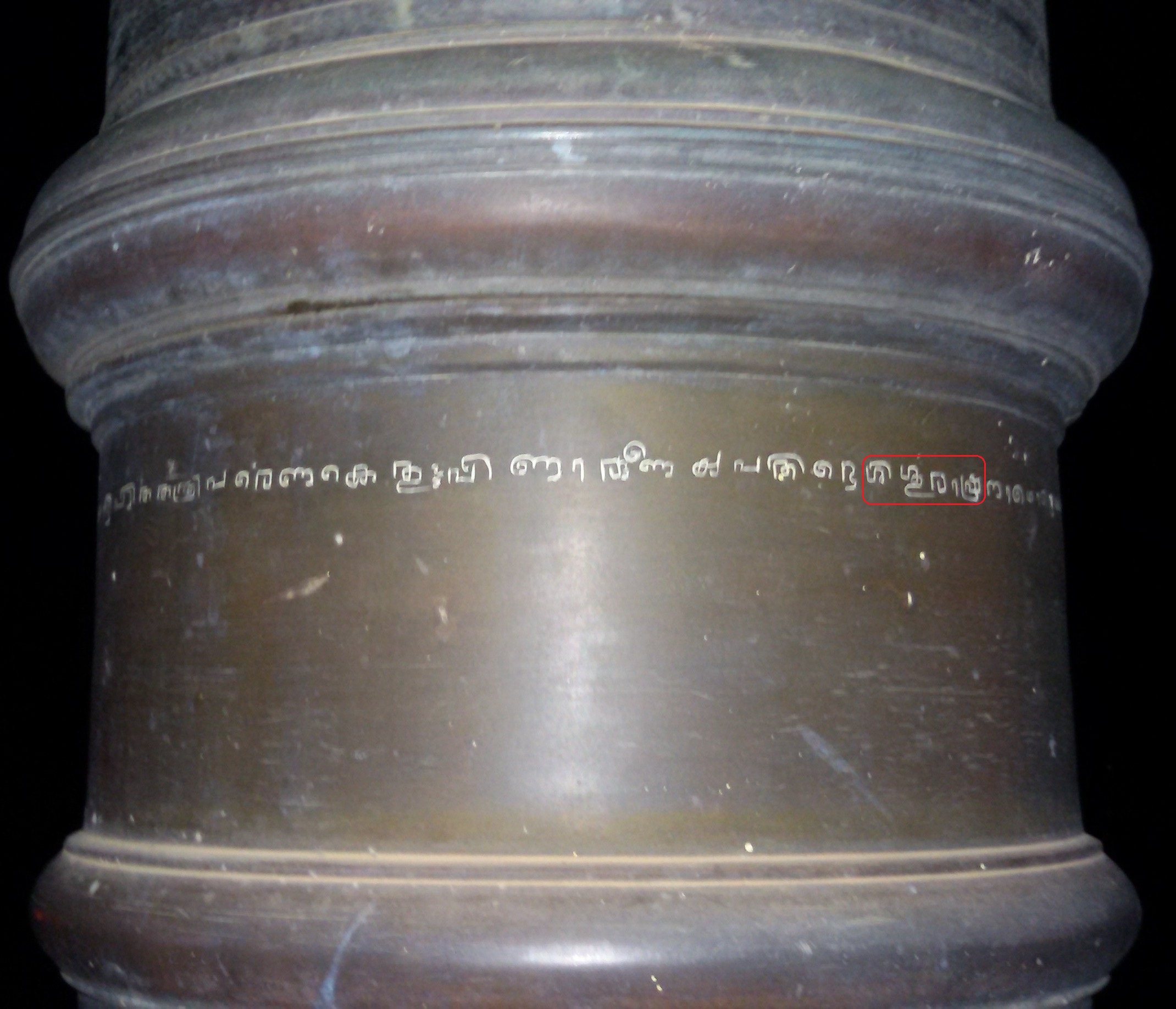 ചെറിയനാട് ക്ഷേത്രത്തിലെ കൊടിമരപ്പറയിലെ ശ്ലോകത്തിലെ ഒരു ഭാഗം.